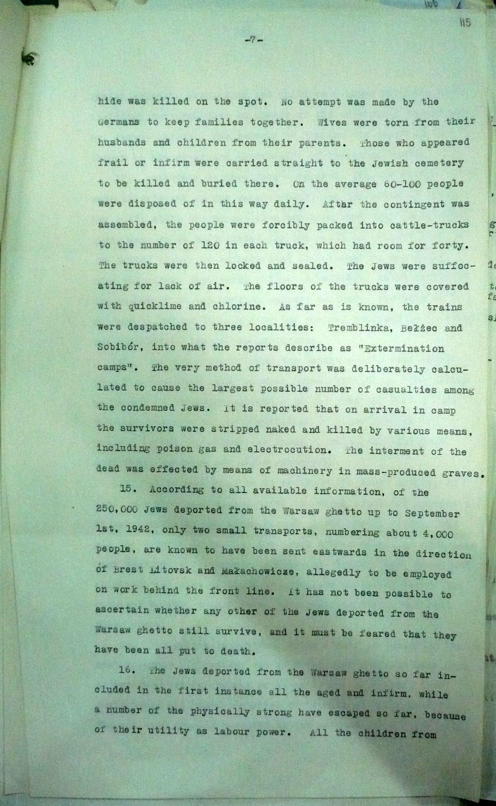 "Nota Raczyńskiego", 10 grudnia 1942, Edward Bernard Raczyński.